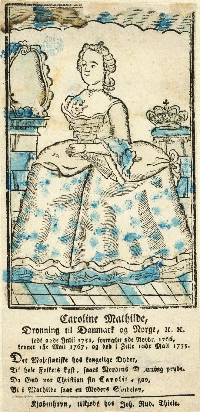 Dronning Caroline Mathilde